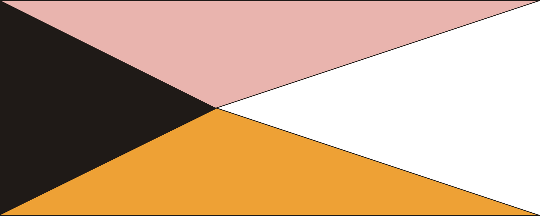 Proporczyk (z kolorem pąsowym) 1 Pułku Artylerii Przeciwpancernej Polskich Sił Zbrojnych na Zachodzie